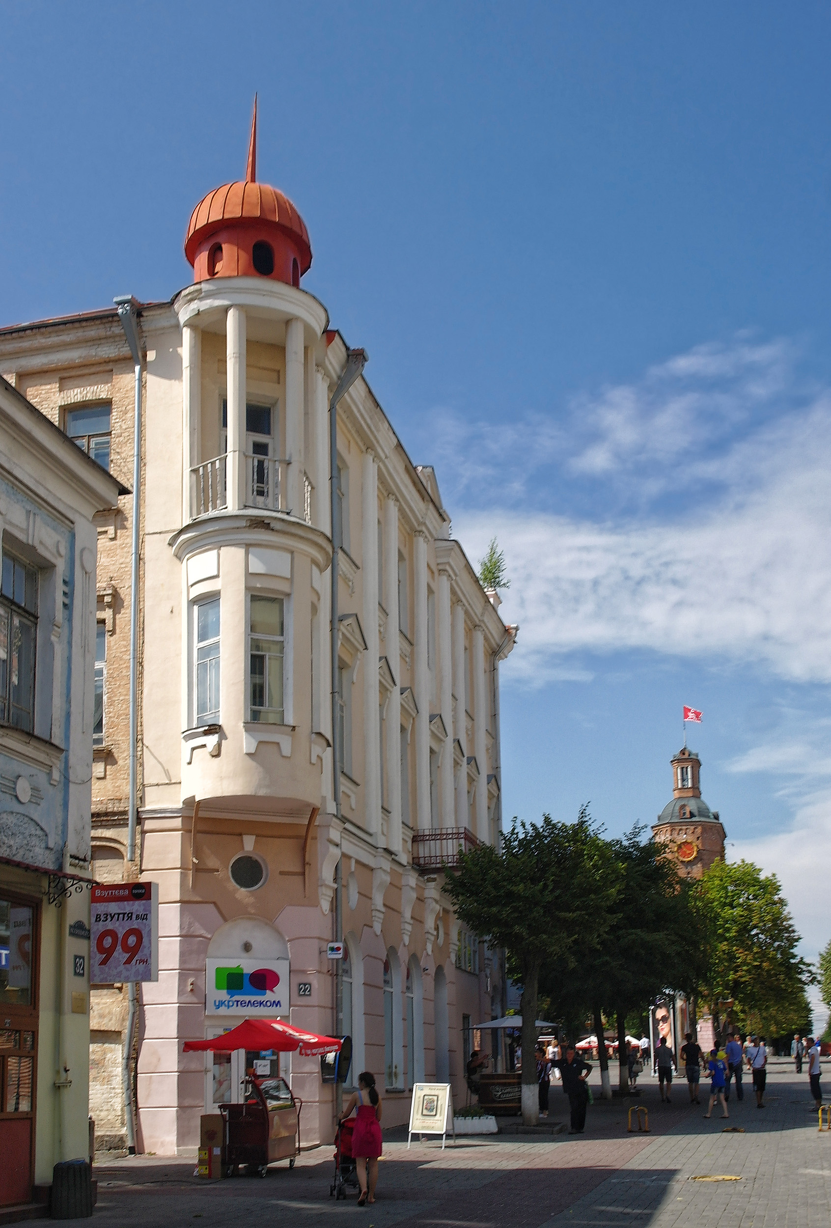 Вінниця, вулиця Козицького, 22